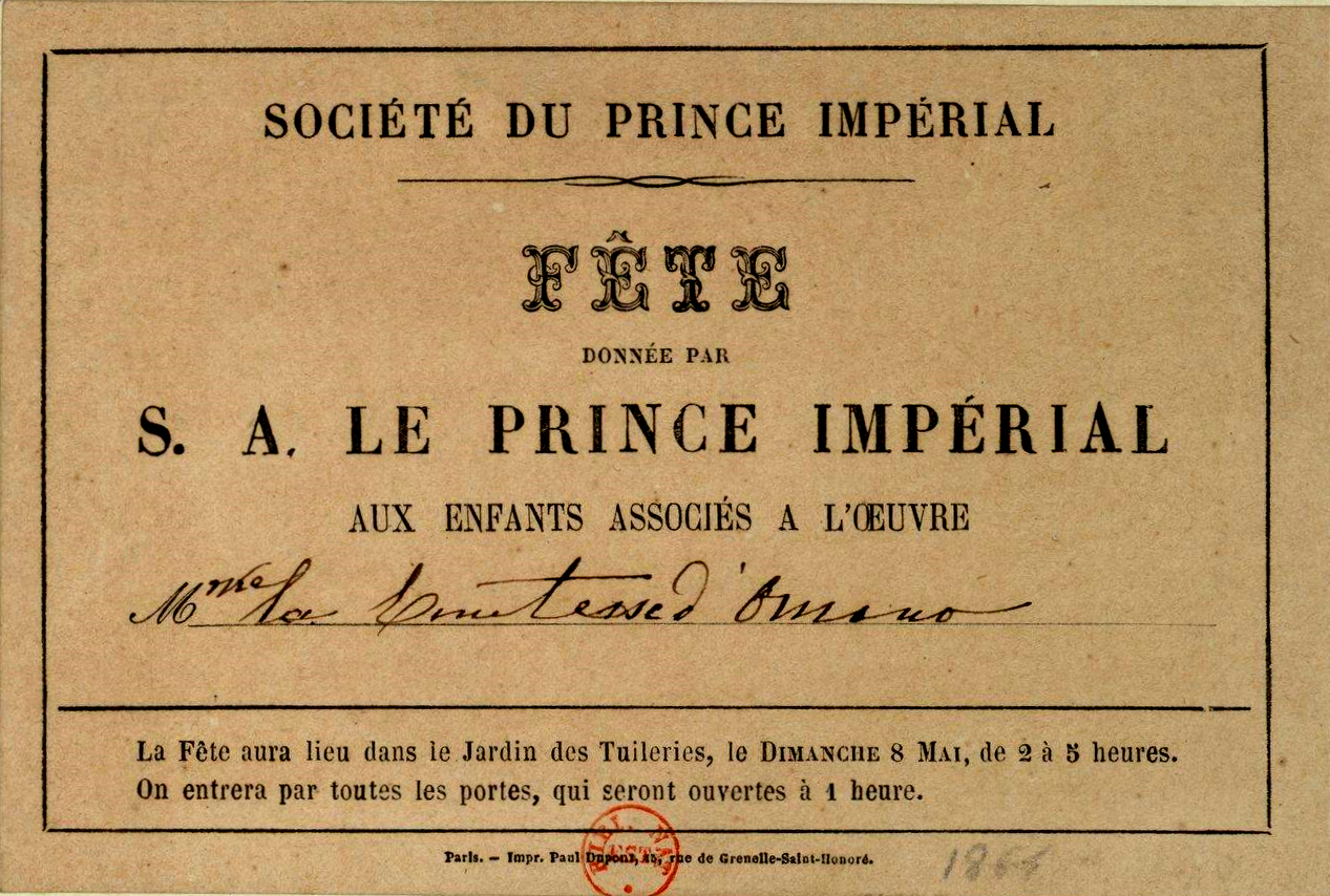 Carte d'invitation à la "Fête donnée par S. A. le Prince Impérial aux enfants associés à l'oeuvre" adressée par La Société du Prince Impérial (Napoléon IV) à la Comtesse d'Ornano en 1864. La fête était située au Jardin des Tuileries (palais impérial) à Paris, le dimanche 8 mai 1864.